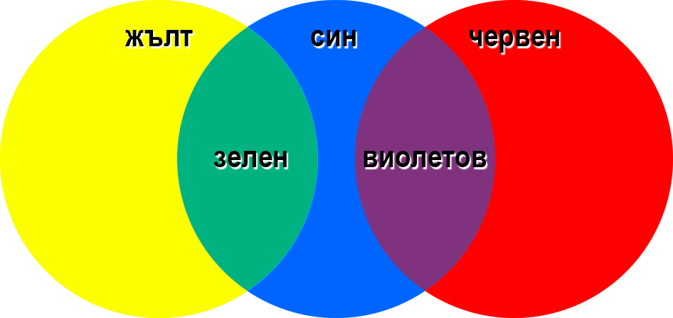 Цветове получени от синия цвят при смесване със жълт и червен.